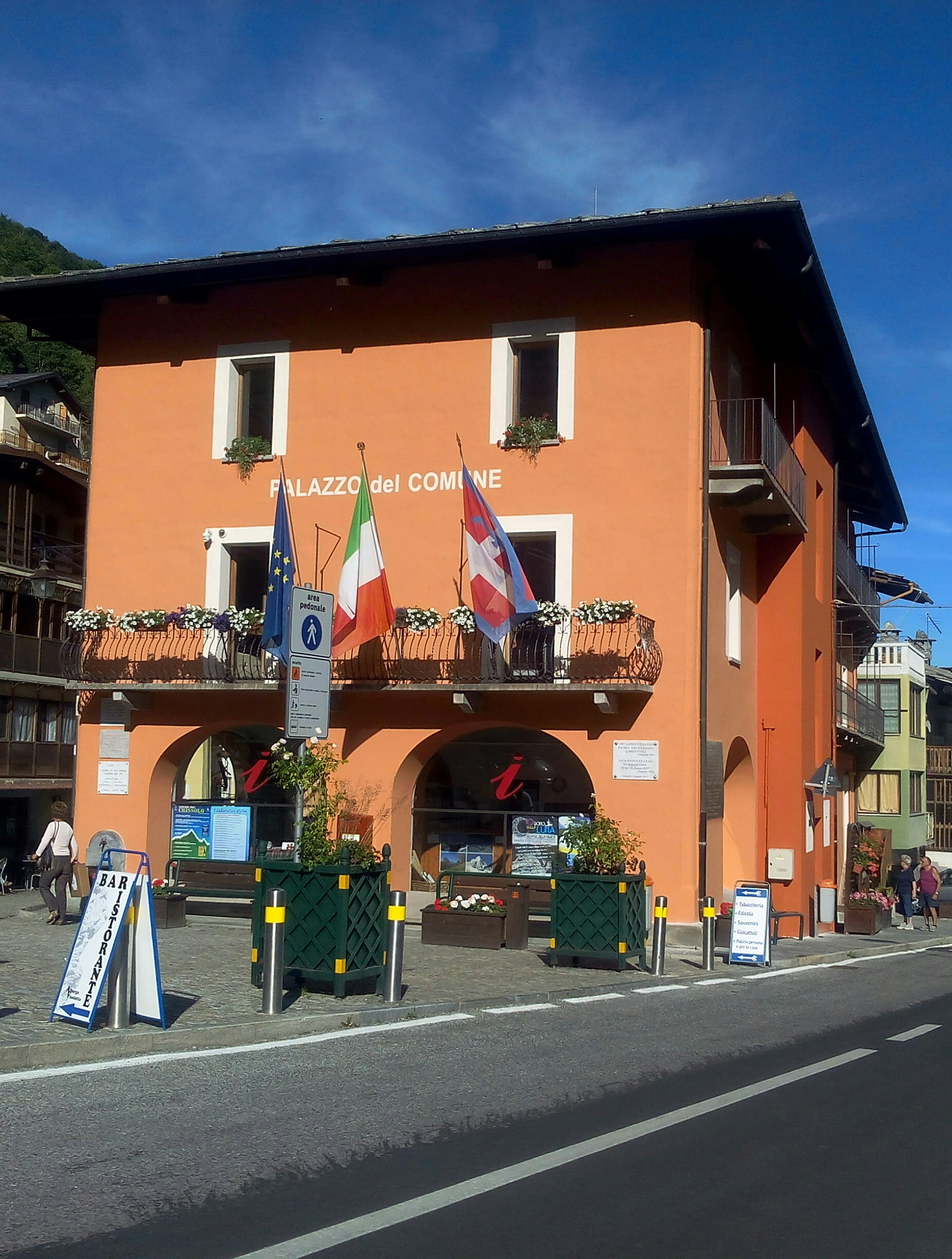 Crissolo (CN) municipio